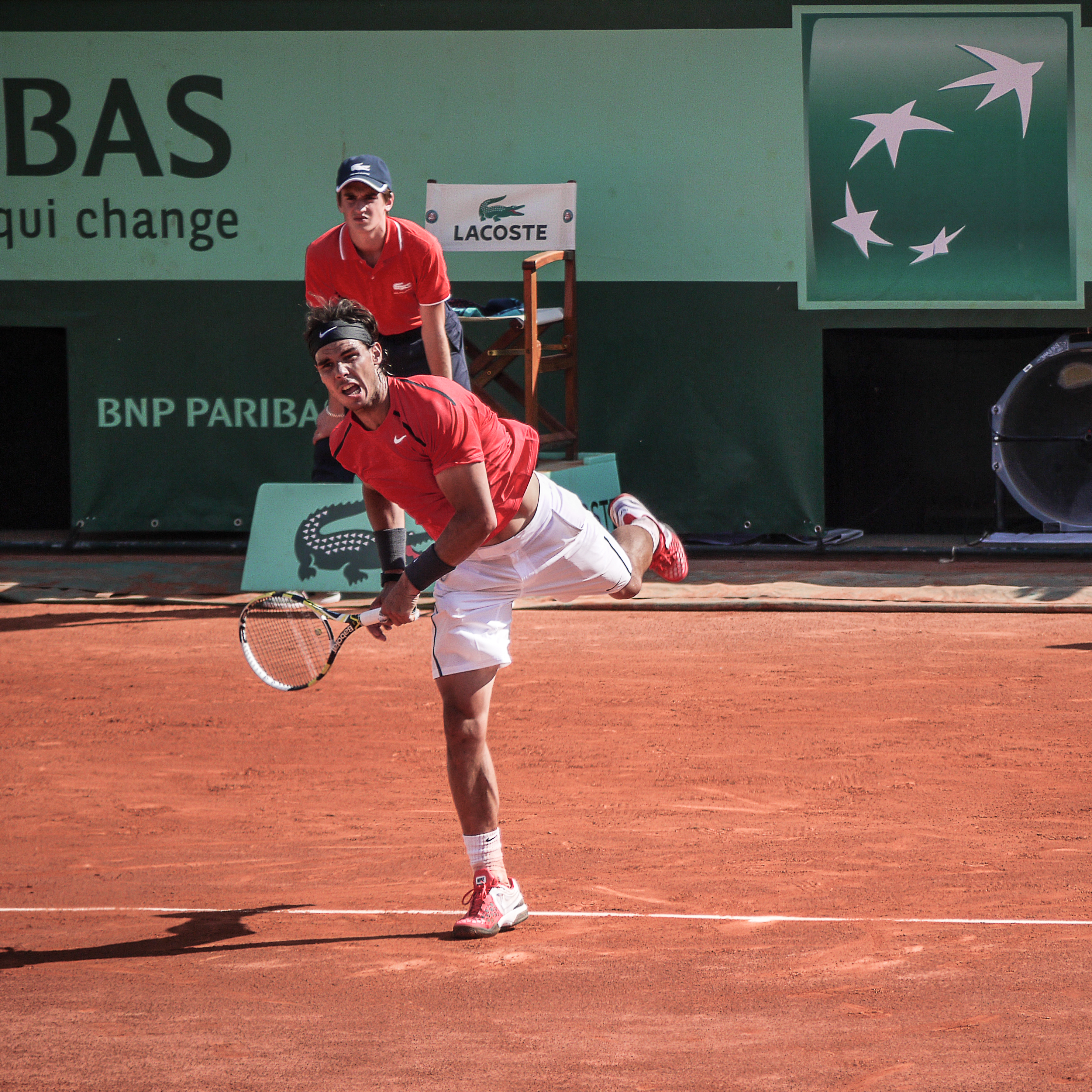 1er tour Roland Garros 2012 : Rafael Nadal (ESP) def. Simone Bolelli (ITA)